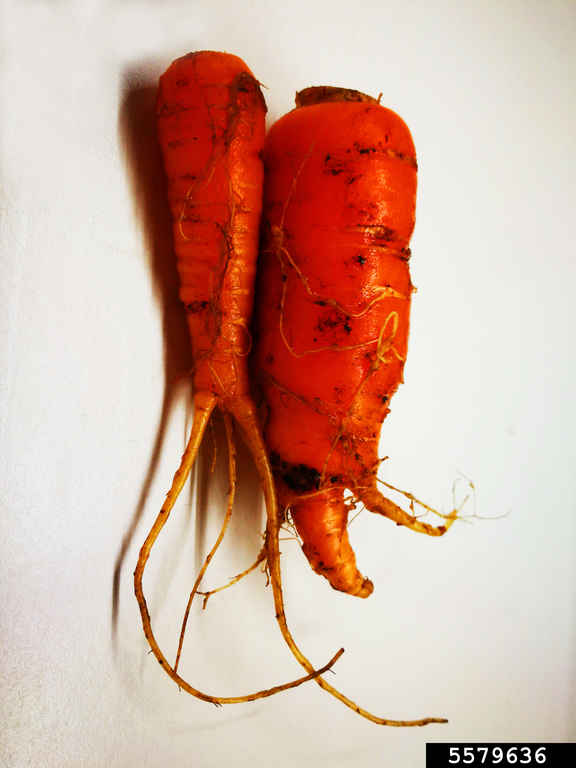 Meloidogyne hapla at Daucus carota